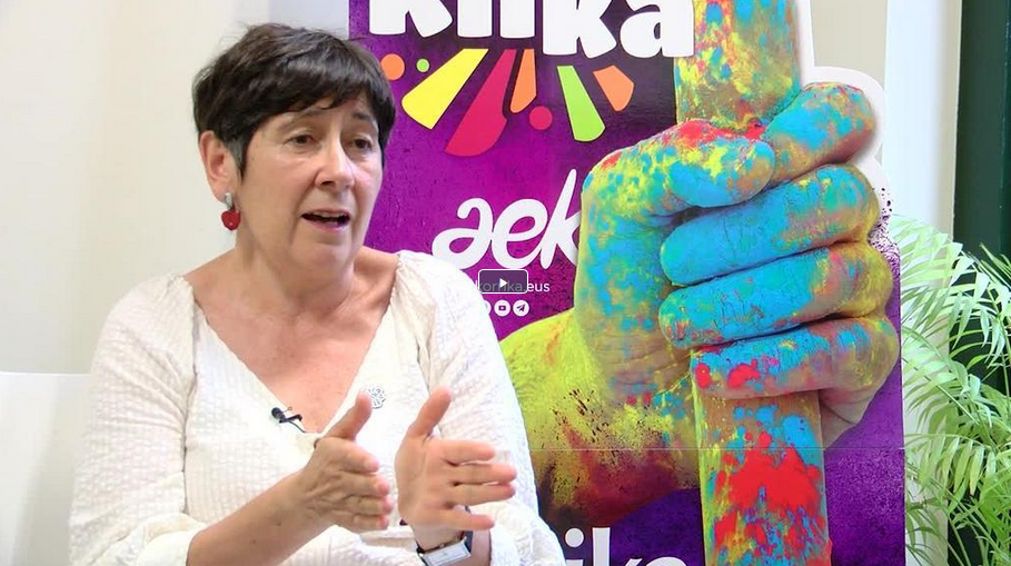 Mertxe Mugika euskara irakaslea 2019ko Korrika aurkezten